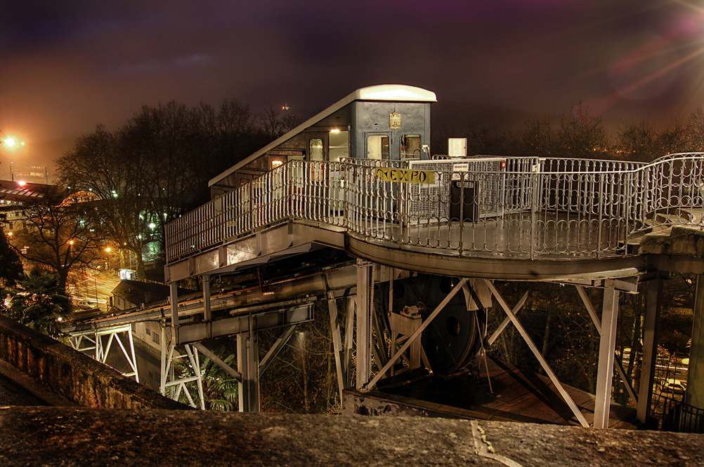 Funiculaire de la Ville de Pau au niveau du Boulevard des Pyrénées et de la Place Royale